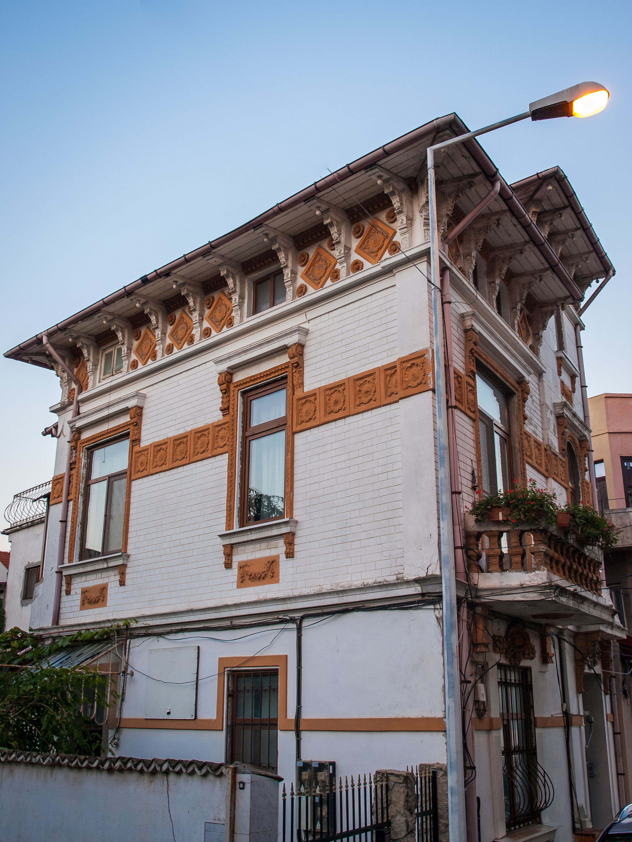 Casa - Str. Sulmona 10 - 1890, Constanta